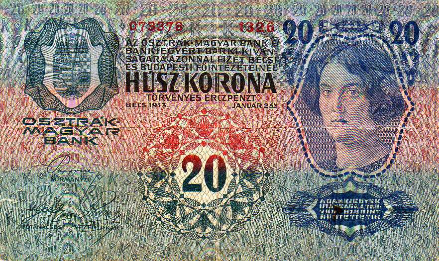 20 Austro-Hungarian Krone/korona (1913) - reverse